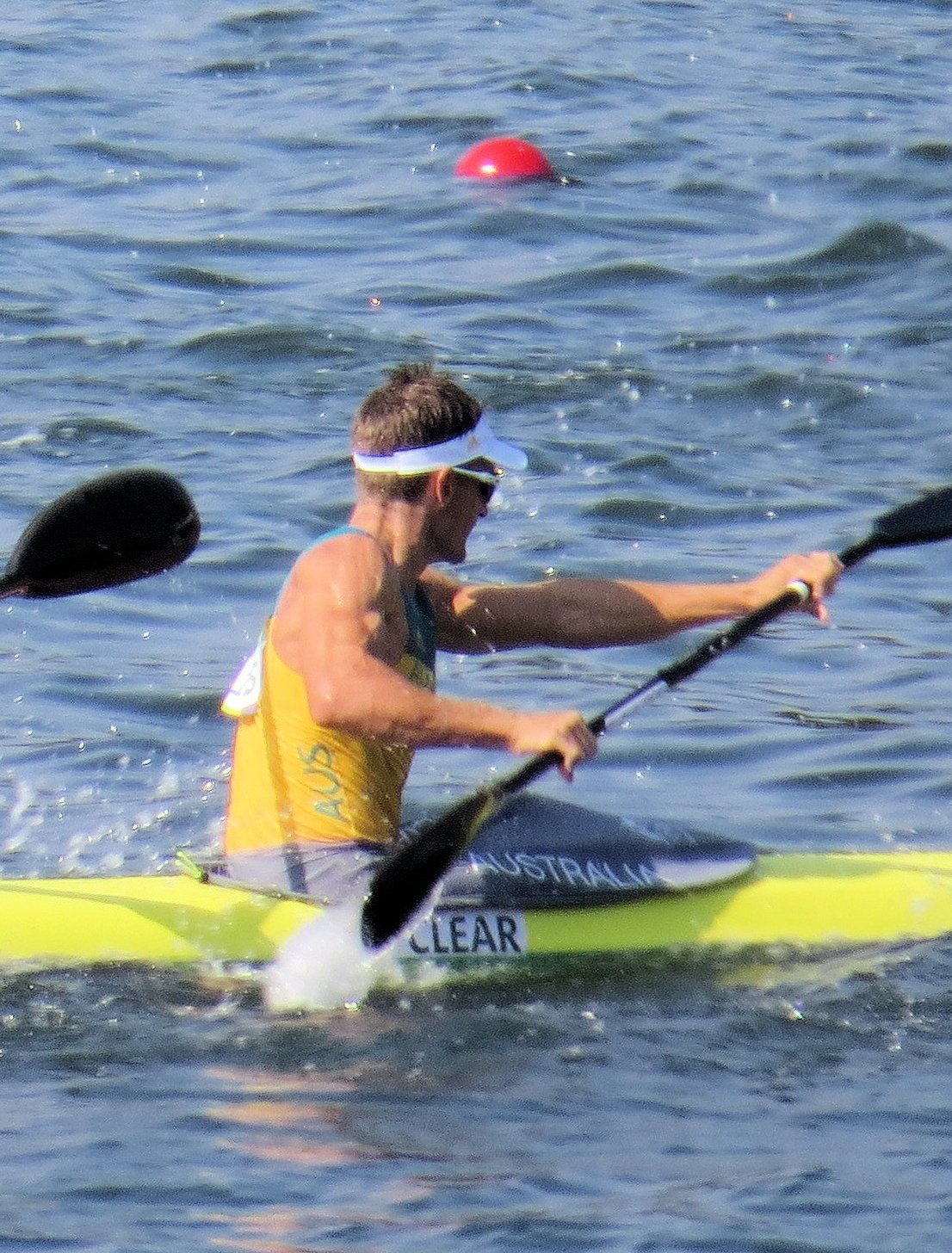 Sx50